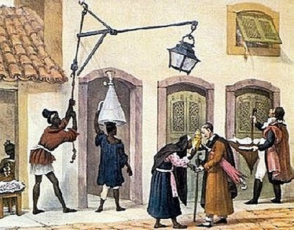 Jean-Baptiste Debret: Coleta de esmolas para as irmandades; nesta imagem vê-se um negro contribuindo com dinheiro a um padre (e uma mão, da janela da casa, também), enquanto diversos escravos que exerciam profissões remuneradas para rendimento de seus senhores são retratas como plano de fundo (da esquerda para a direita): um vendedor ambulante, um acendedor de lampião e um entregador de água.